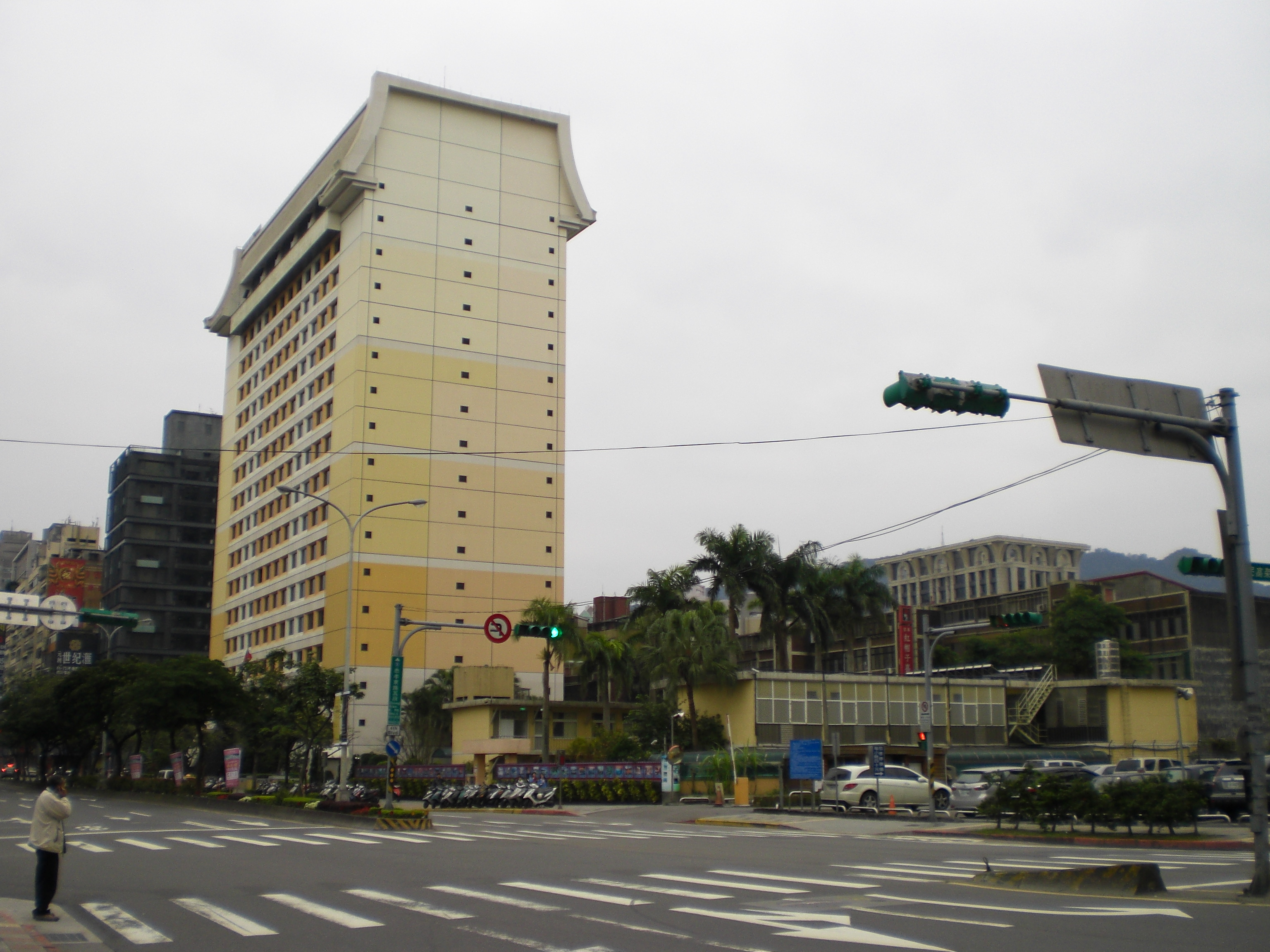 中華民國行政院國軍退除役官兵輔導委員會大樓，位於臺灣臺北市信義區忠孝東路五段222號。